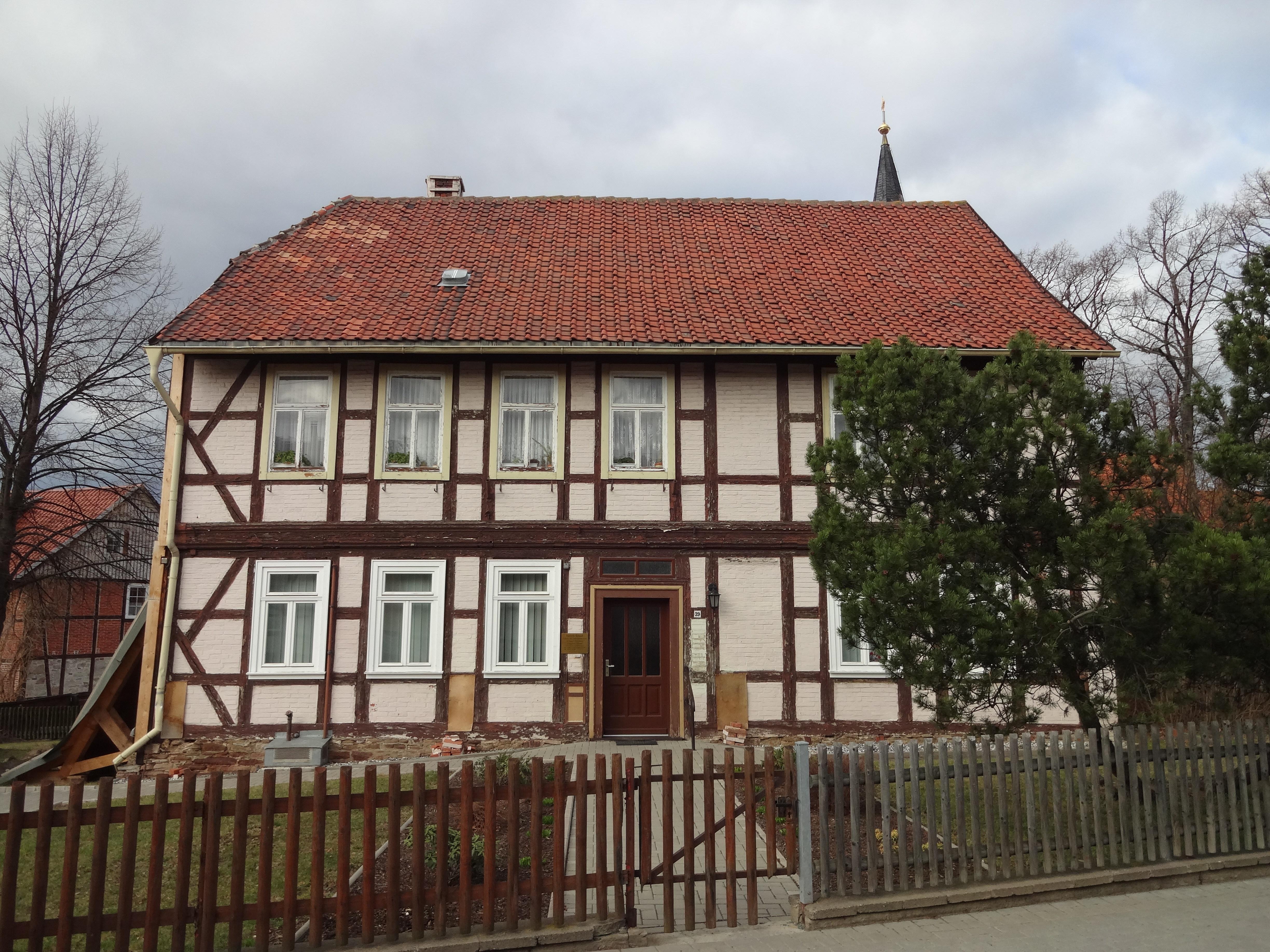 Harzstraße 39 in Silstedt, Kulturdenkmal in Silstedt, Ortsteil von Wernigerode